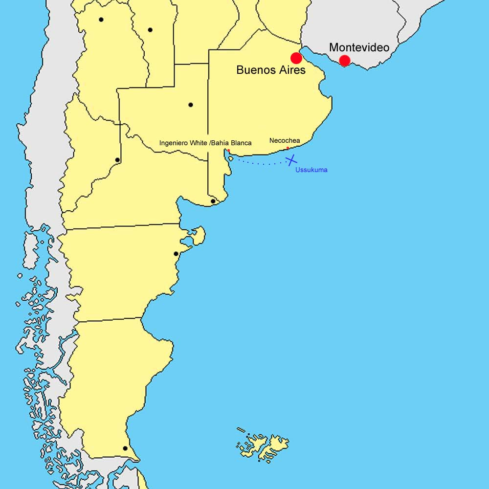 Lage von Ingeniero White, von Necochea und von der selbstversenkten Ussukuma.